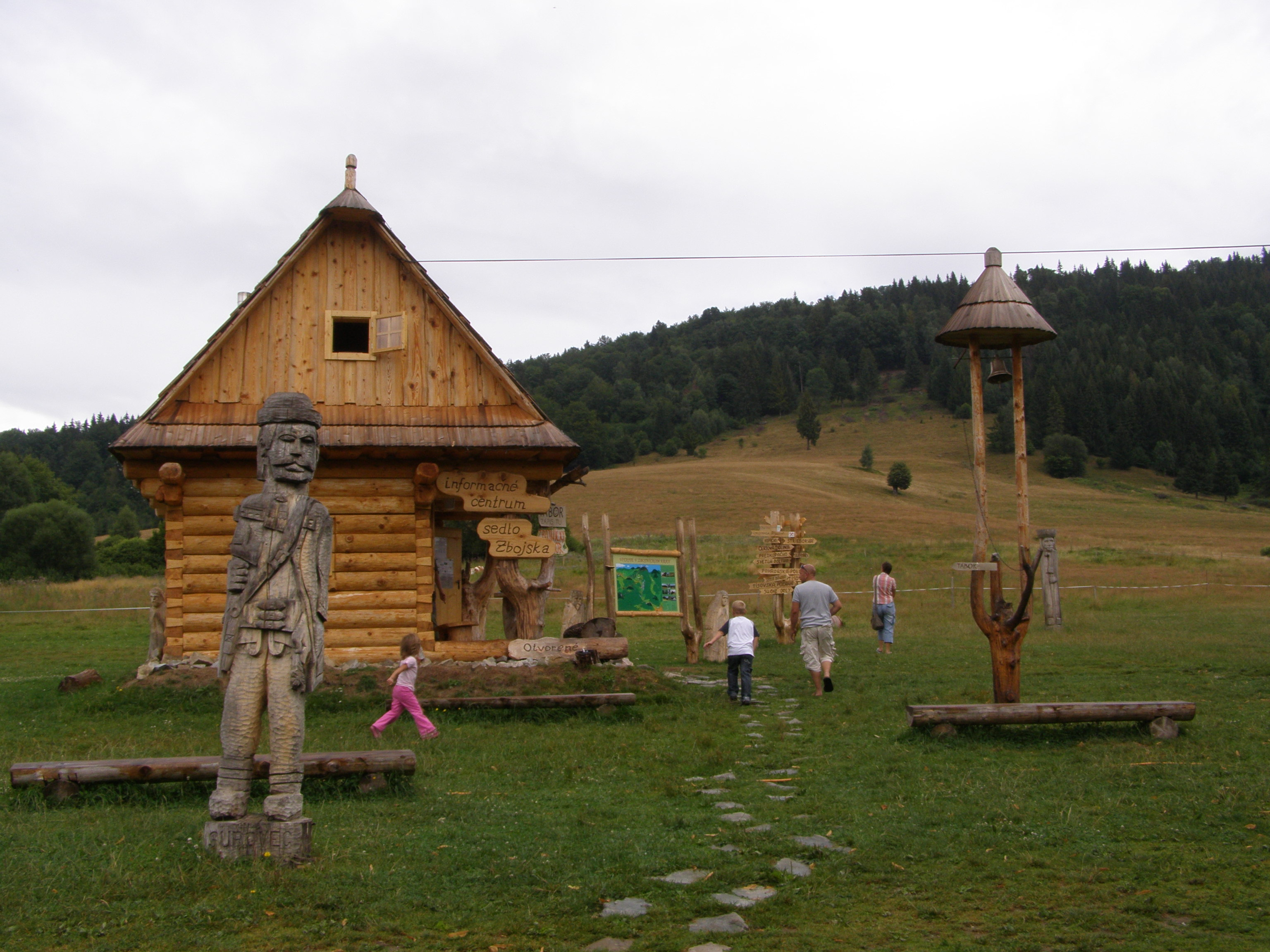 Slovenské rudohoří, Veporské vrchy, Fabova hoľa, sedlo Zbojská